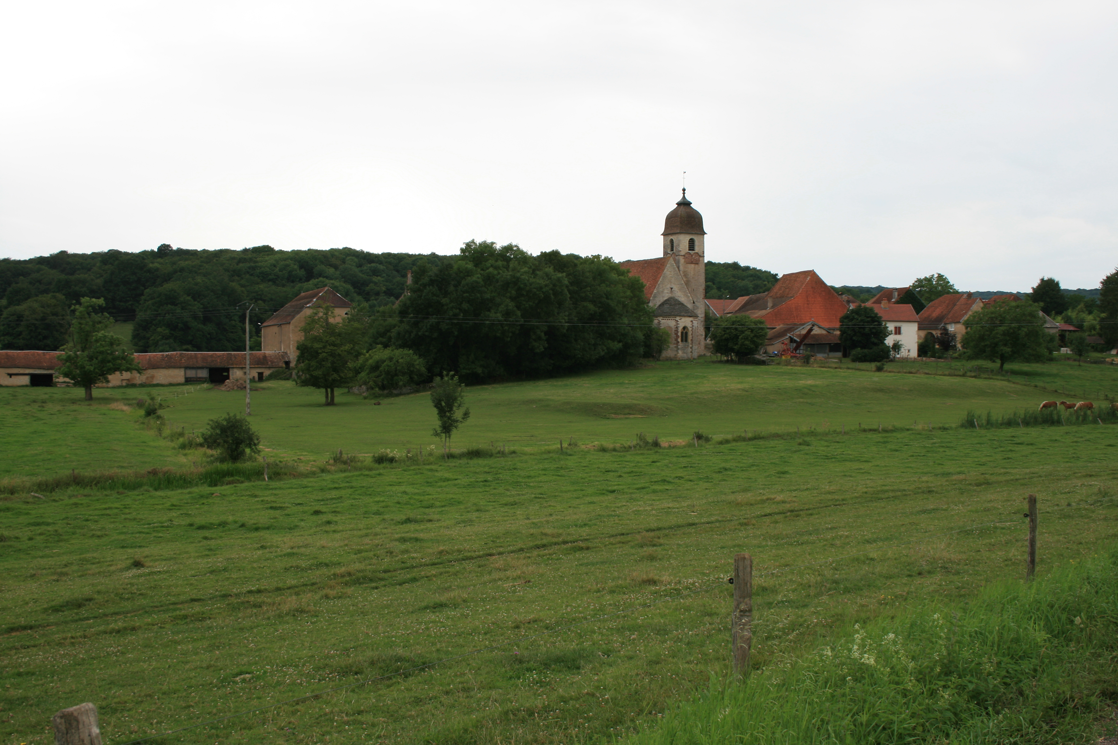 Marast ( Haute-Saône ) vue d'ensemble du village prise depuis la route menant à Moimay